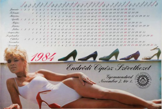 Bíró Ica magyar fitnesz-szakértő, modell, színésznő, énekesnő.